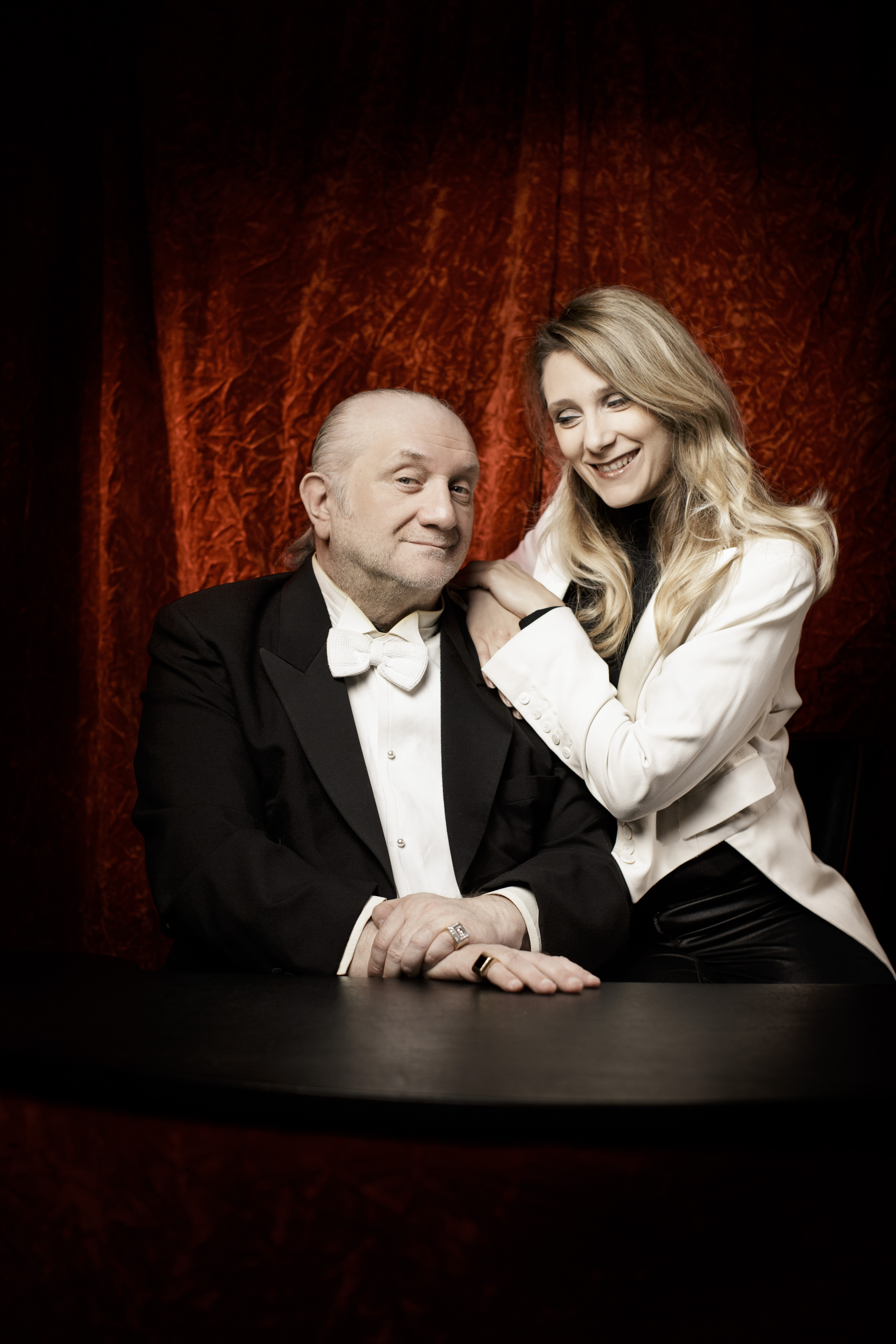 Dominque et sa fille Alexandra Duvivier